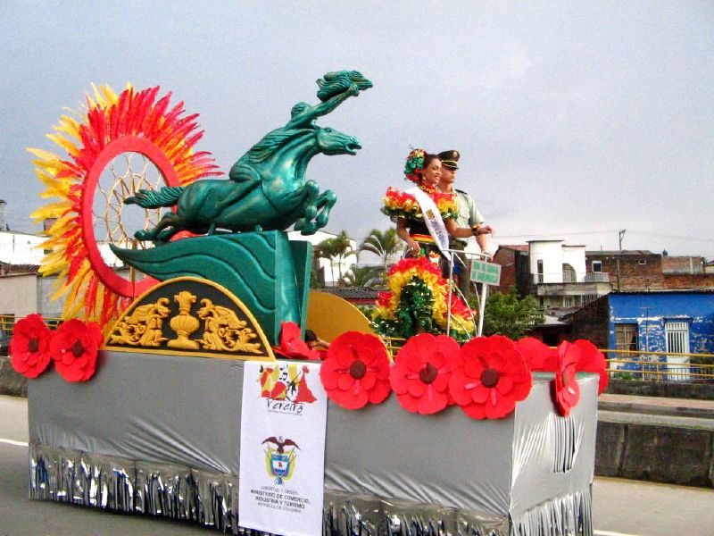 Reina del Carnaval de Barranquilla 2006 en Pereira